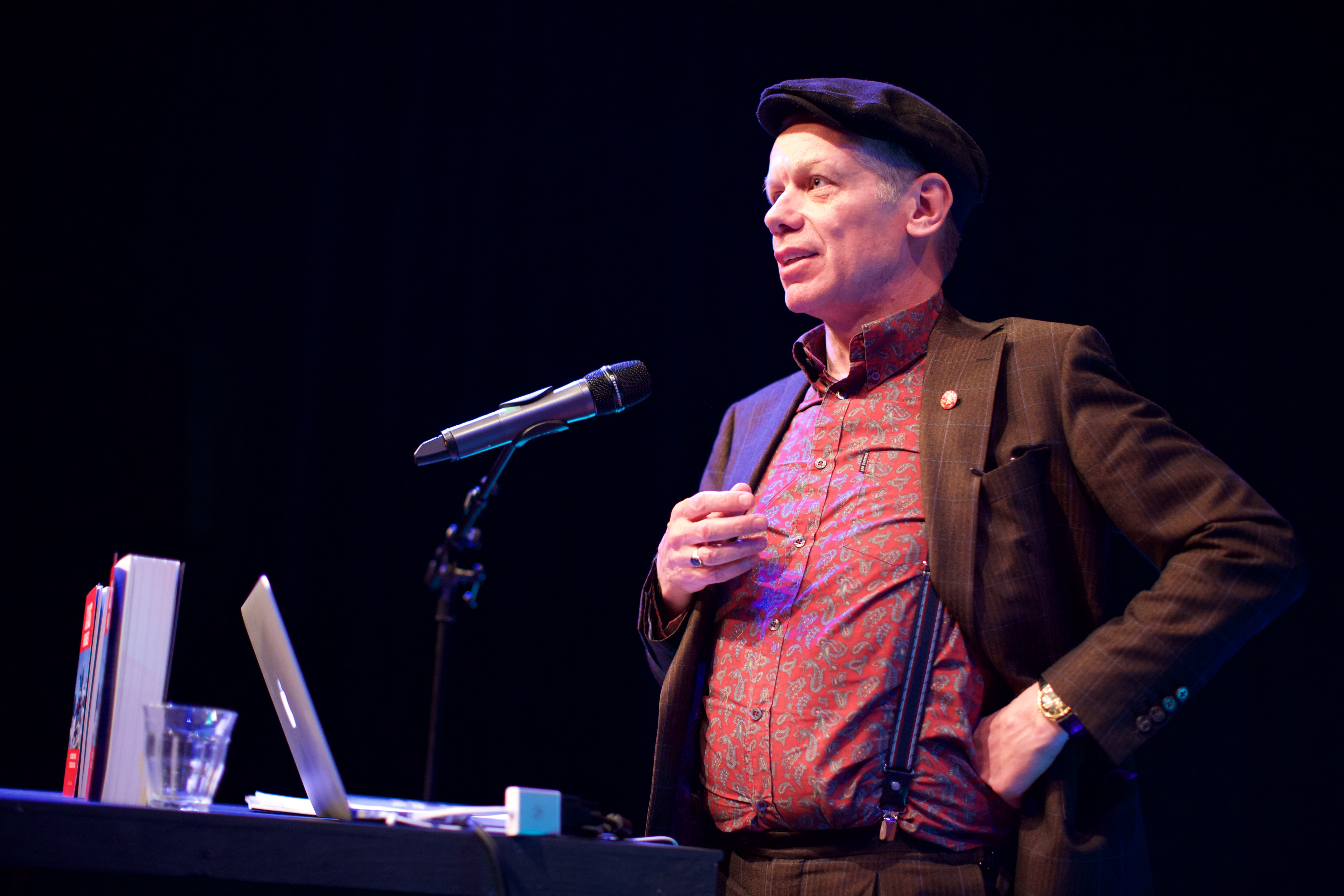 Op 29 en 30 april vond het minifestival New Gamegrounds rond games, theater en de tirannie van de schepper plaats. De Brakke Grond in samenwerking met Playful Arts Festival lieten tijdens het festival de werelden van games, theater en performance bij elkaar komen.